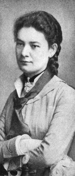 Ernestine Schumann-Heink as a young woman